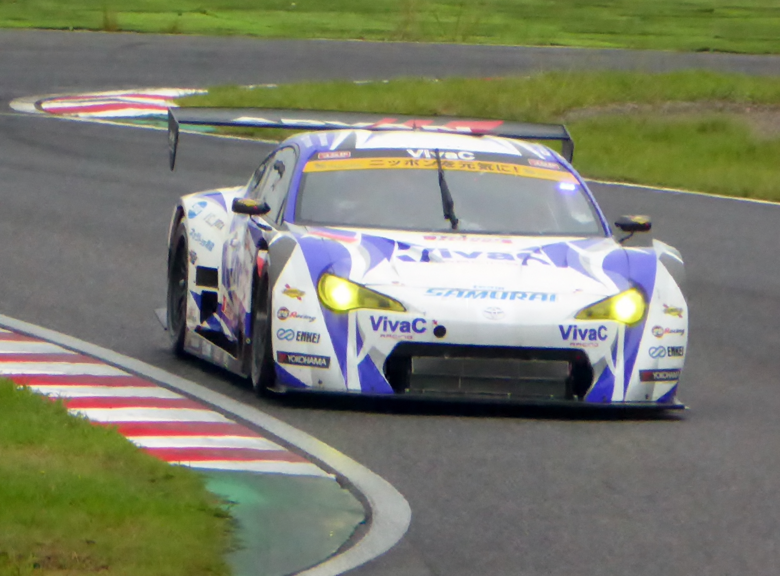 2015年鈴鹿1000㎞において25号車VivaC 86 MCを撮影。